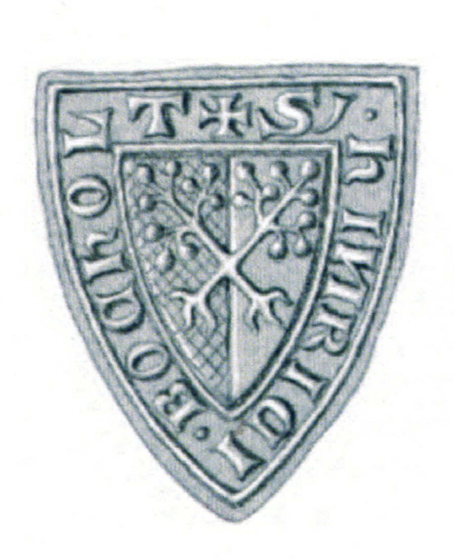 Siegel des Ratsmannes Hinricus (II.) Bochold (es gab drei Hinricus, zwei davon waren Ratsmänner, einer Bischof) . Das Siegel weicht von den üblichen Siegel der Familie ab. Siehe Emil Ferdinand Fehling: Lübeckische Ratslinie, Nr. 302 (Hinrich von Bokholt).